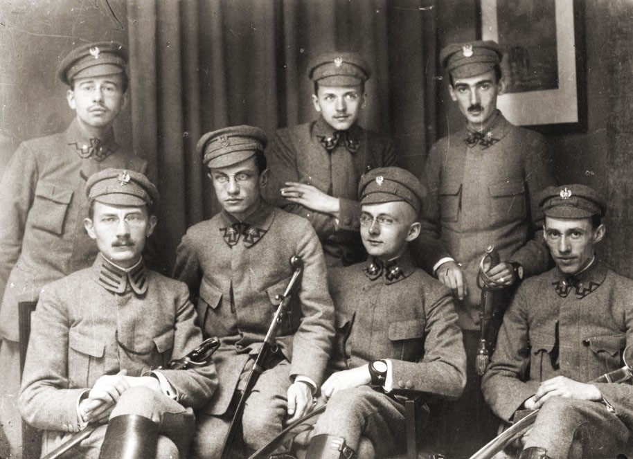 Komenda Naczelna Polskiej Organizacji Wojskowej w roku 1914. Od lewej, widoczni: podporucznik Al. Tomaszewski (stoi pierwszy z lewej), D. Zawistowski (siedzi pierwszy z lewej), podporucznik Konrad Libicki (siedzi drugi z lewej), podporucznik Marian Zyndram Kościałkowski (stoi drugi z lewej), porucznik Tadeusz Żuliński (siedzi drugi z prawej), podporucznik Wacław Jędrzejewicz (stoi pierwszy z prawej), podporucznik Bogusław Miedziński (siedzi pierwszy z prawej). Uwaga: W czasopiśmie Panteon Polski nr 1/1925 rok zdjęcie podpisano jako Batalion Warszawski POW w 1915.